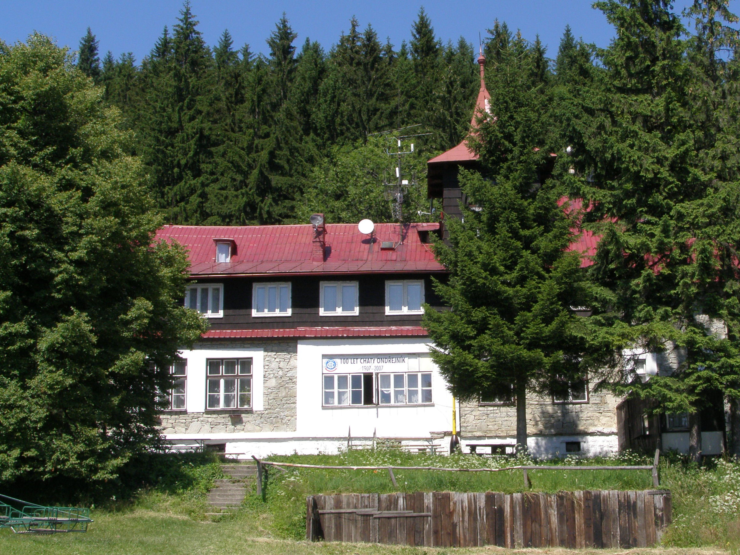 Turistická chata Ondřejník na východním úbočí Ondřejníku v lokalitě Solárka